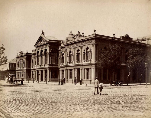 Antigua Mansíon de Juana Ross de Edwards en el lugar de la actual catedral de Valparaíso. Demolida por daños sufridos en el terremoto de 1906.